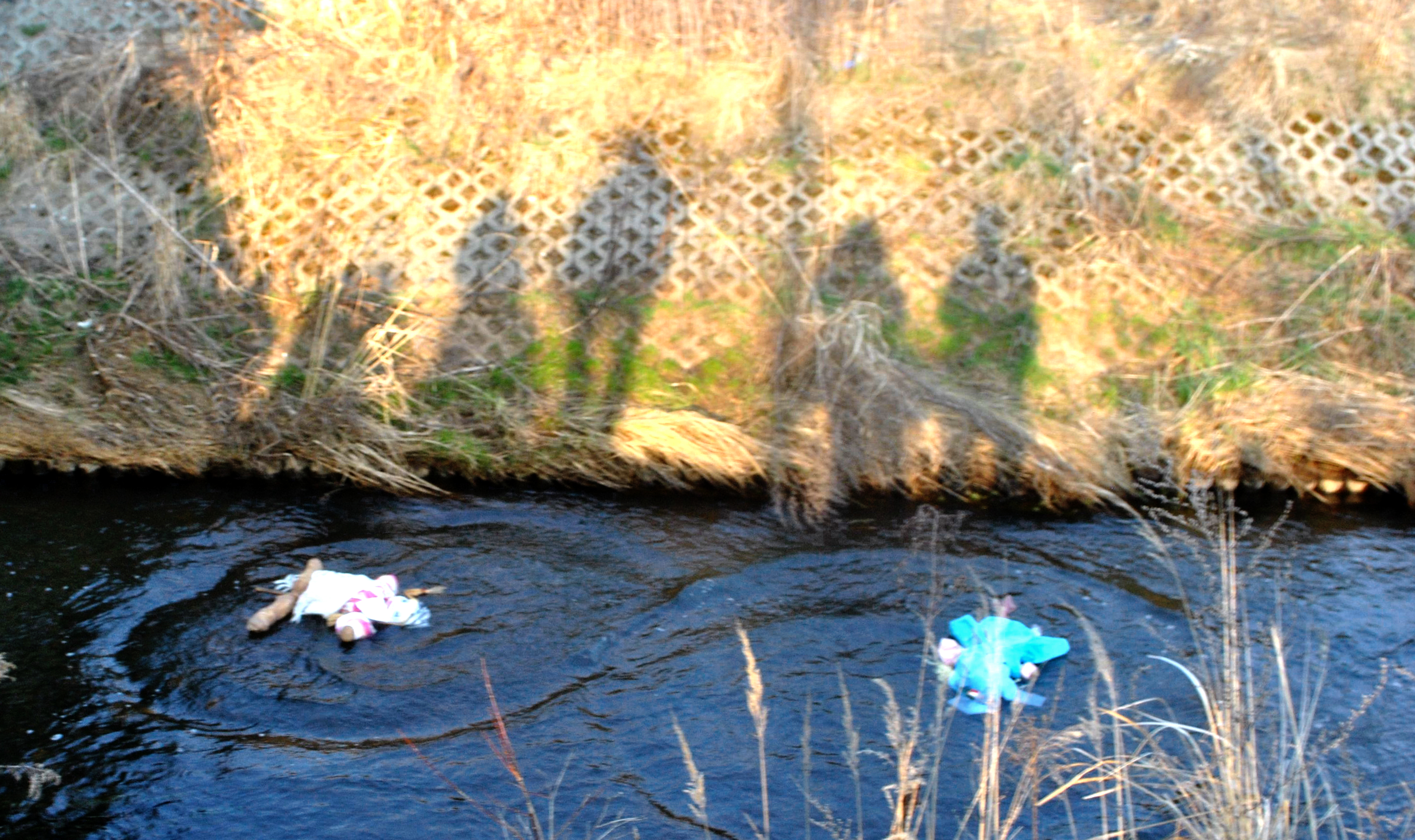 Topienie Marzann w Brynicy - Miasteczko Śląskie, 21 marca 2015